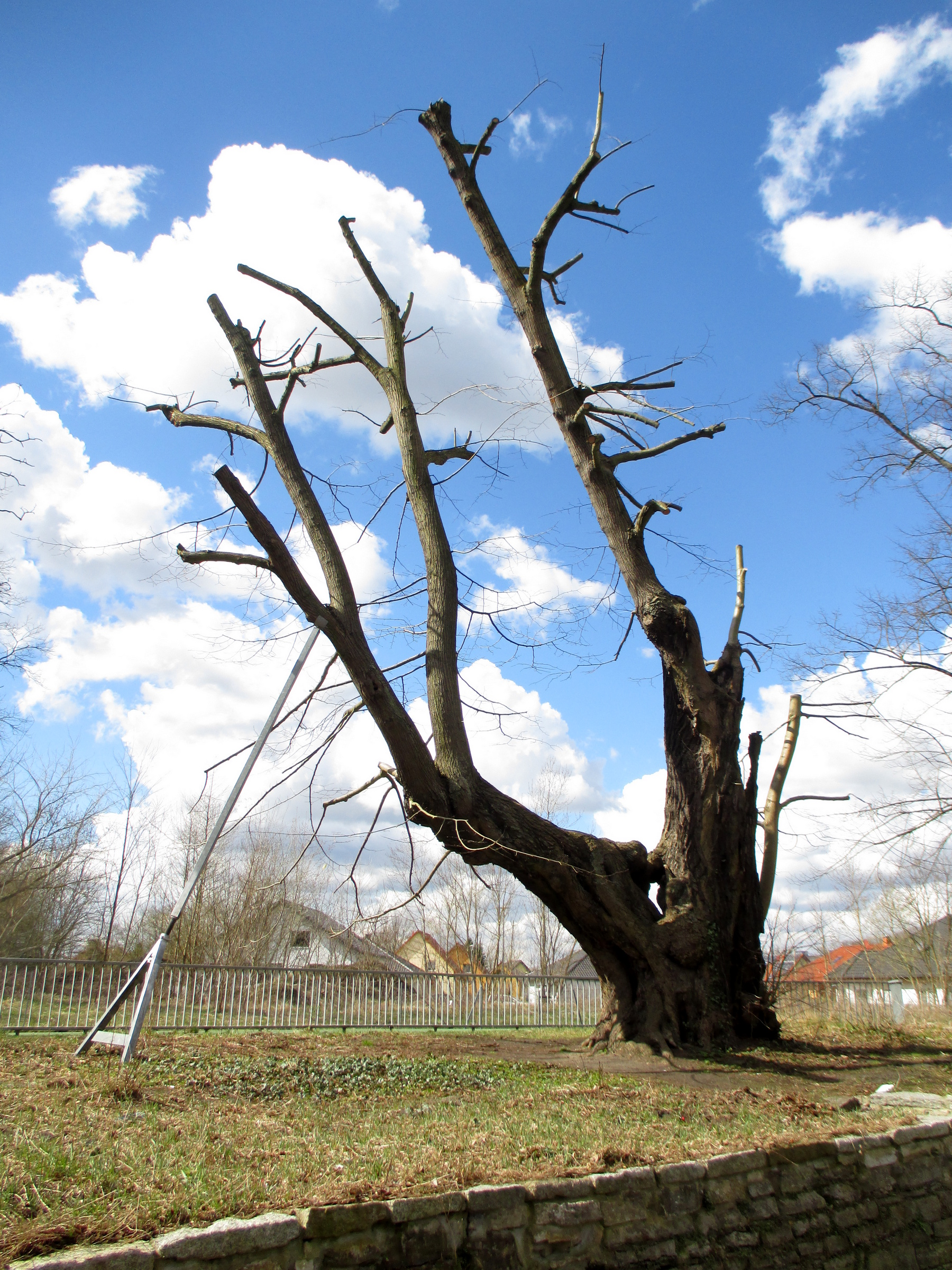 Luckenwalde in Brandenburg. Die Tausendjährige Linde ist ein eingetragenes Naturdenkmal.